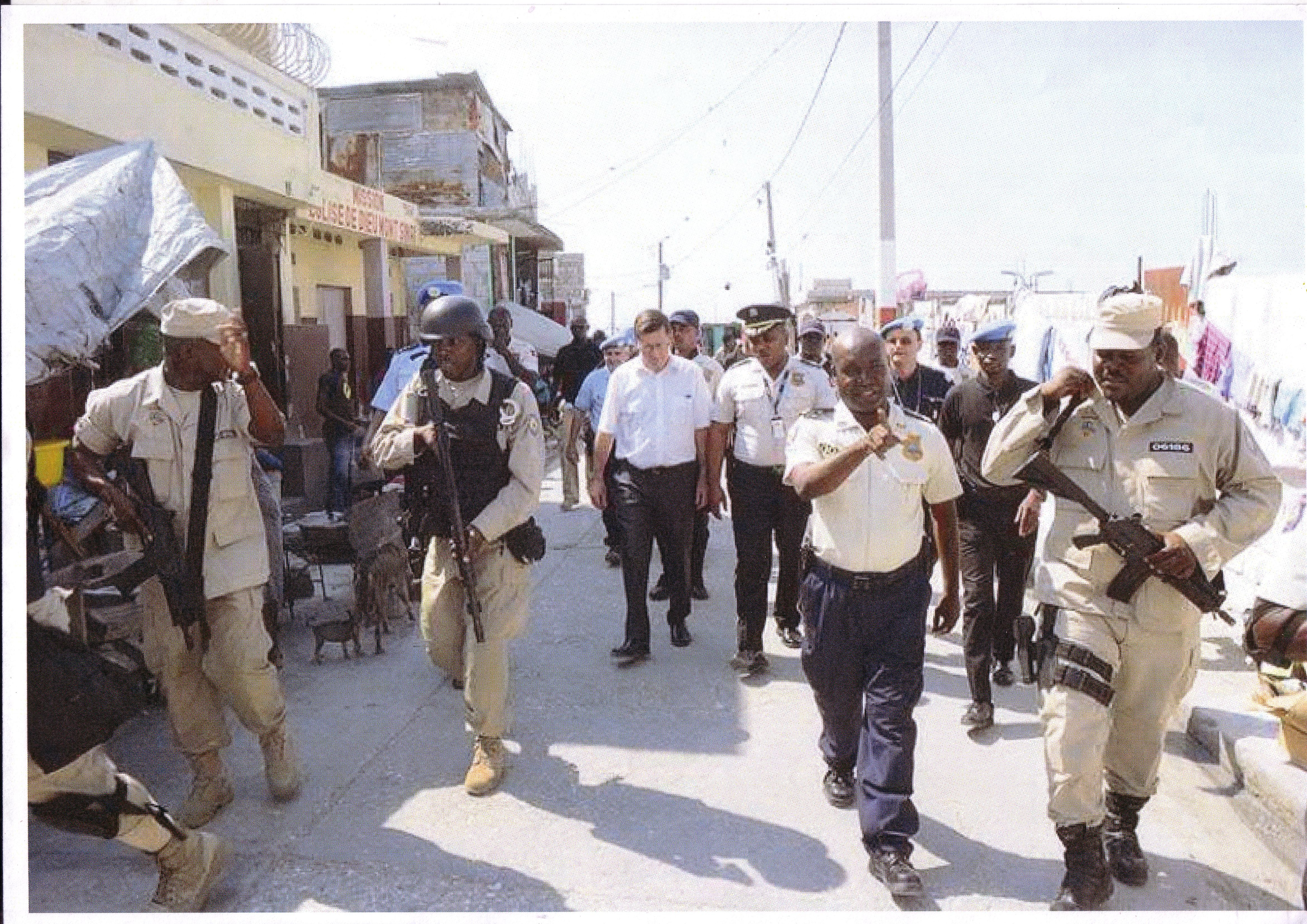 Jean Dussourd à Haïti en mars 2013